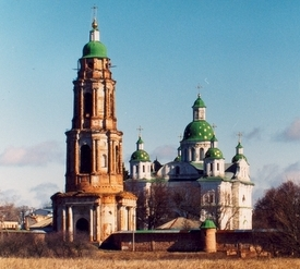 Verklärungs-Kloster von Mhar